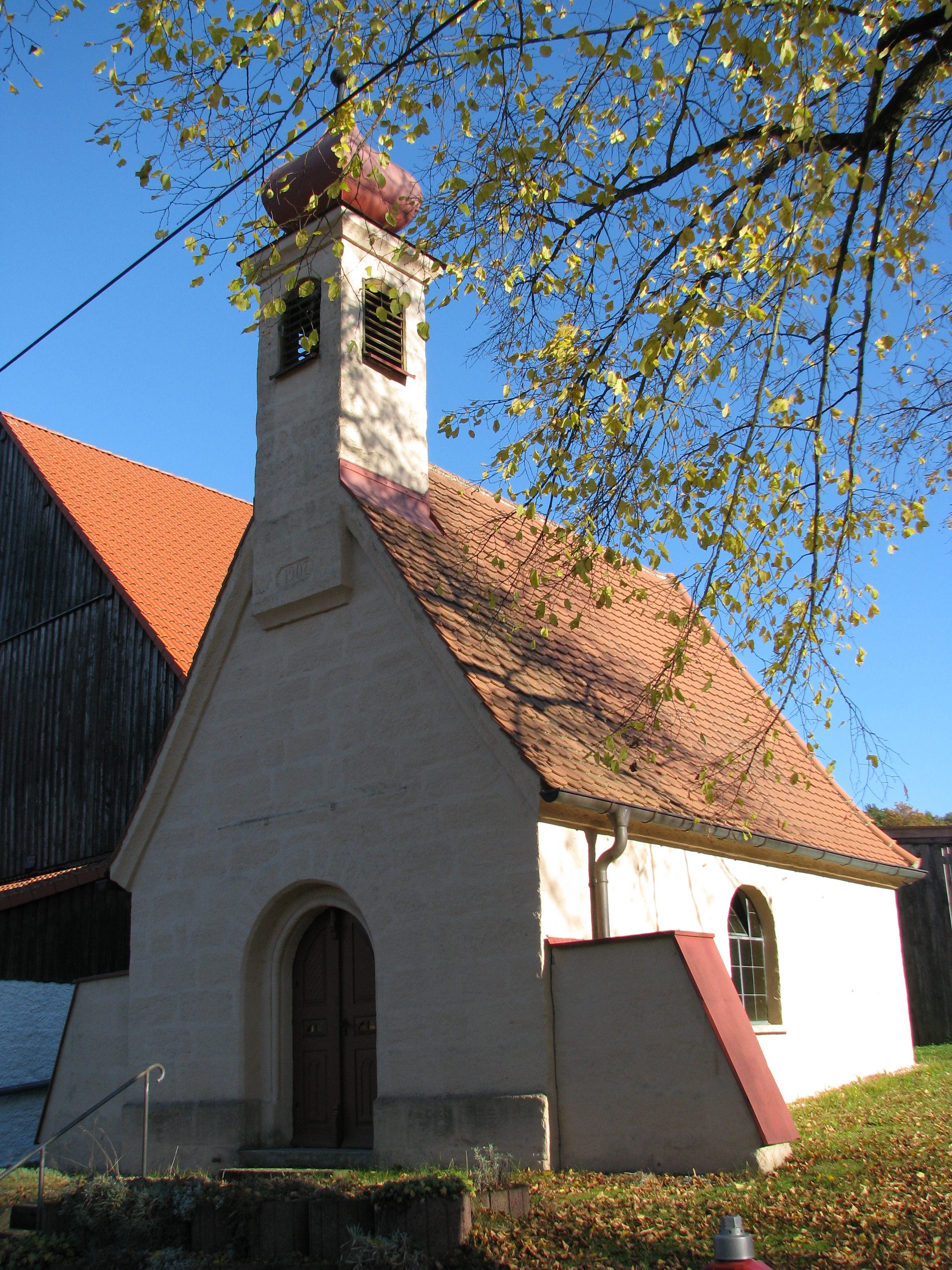 Eibach, Ortsteil von Hilpoltstein im mittelfränkischen Landkreis Roth, Katholische Ortskapelle